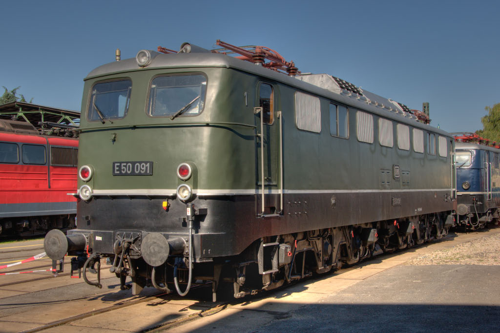 DB Baureihe E 50 DBAG Baureihe 150